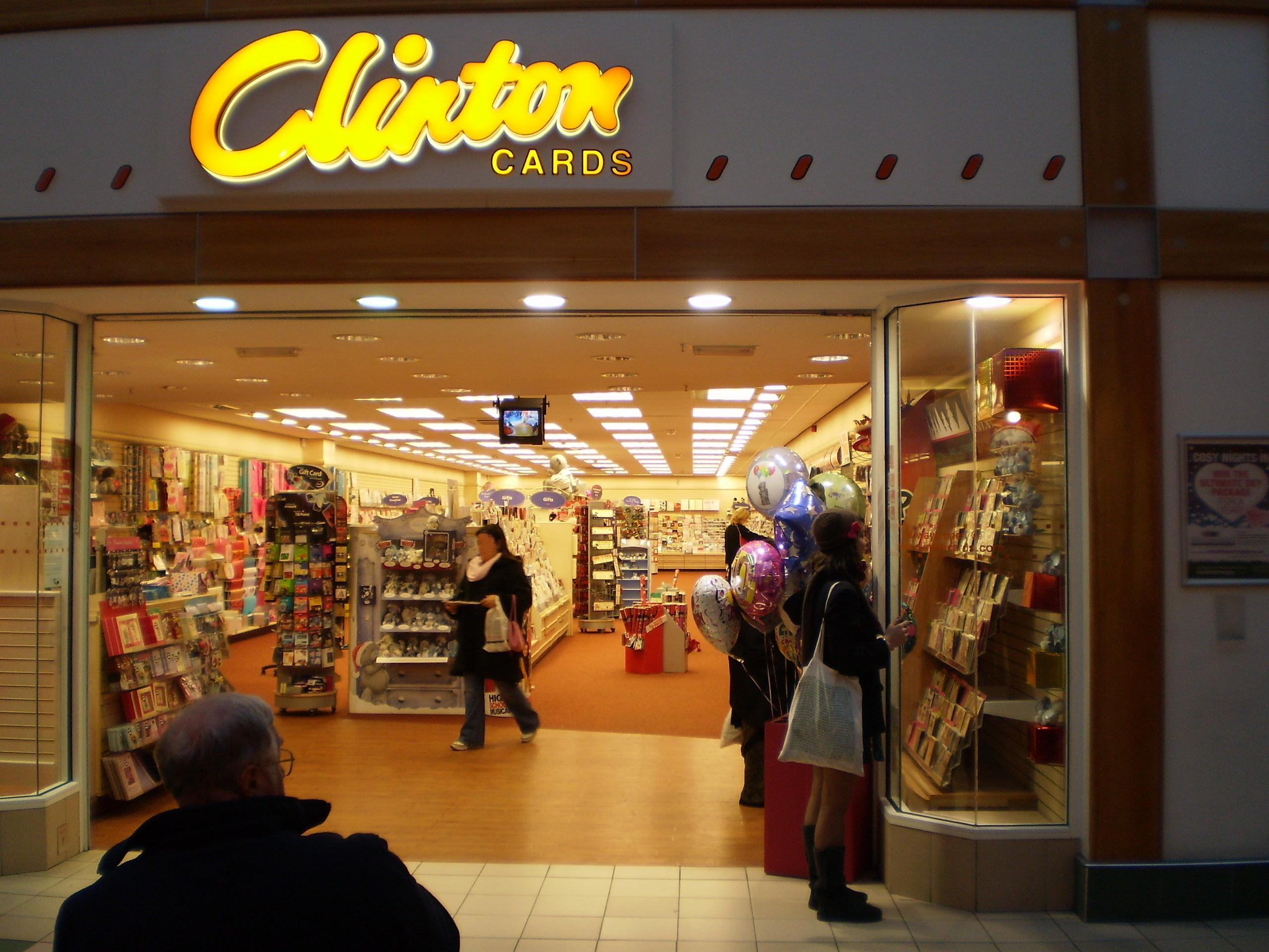 Card Shop. The 3rd biggest in England